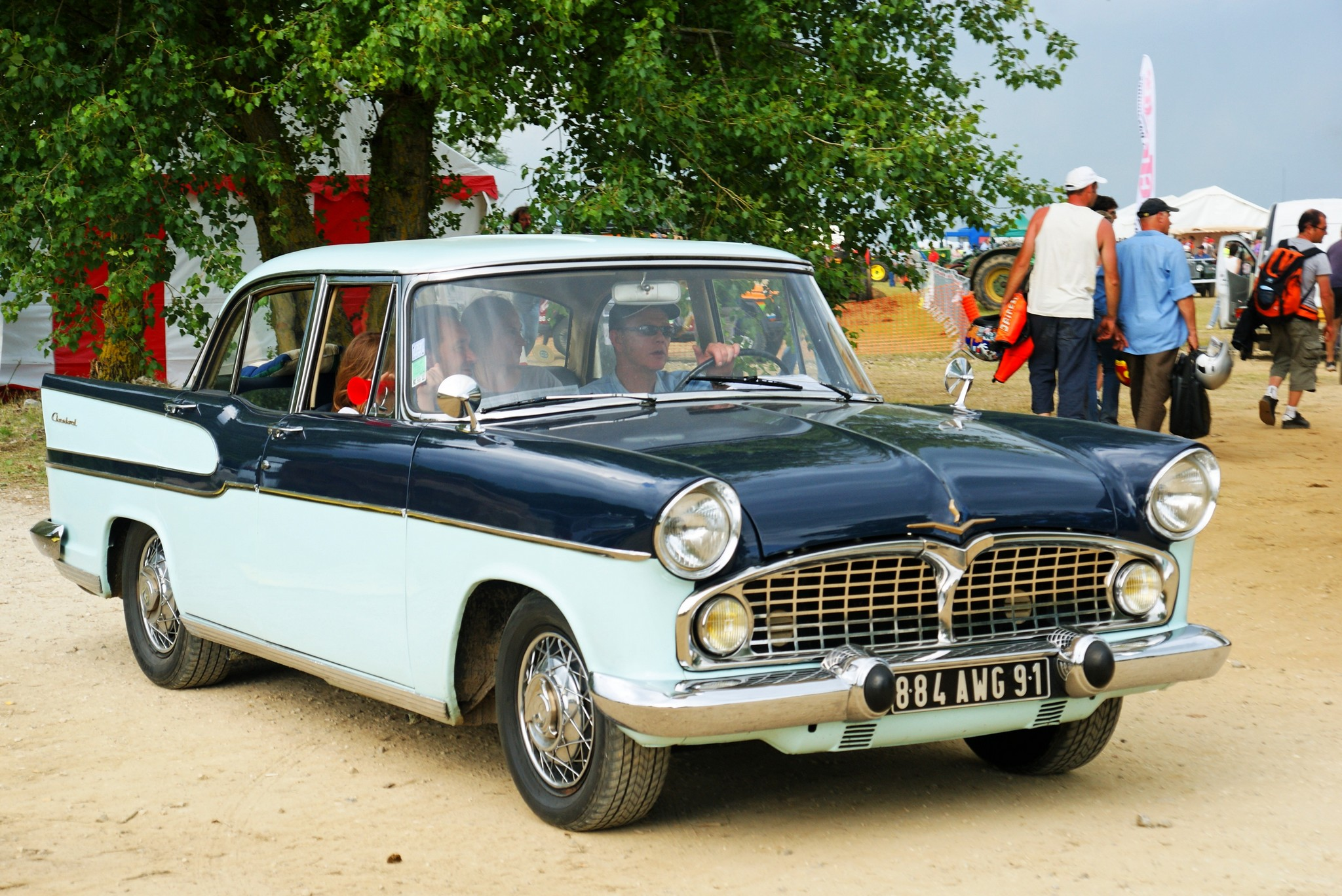 SIMCA CHAMBORD - Locomtion en fête 2009 Un peu d'histoire grâce à METALBAN : En 1954 fort de ses succès commerciaux, Henri-Théodore PIGOZZI (PDG de SIMCA) rachète Ford SAF et dispose ainsi d'une gamme au dessus de l'Aronde et surtout d'une usine ultra-moderne à Poissy. Avec ce rachat la marque présente maintenant une gamme de modèle V8 : les Vedettes puis après quelques évolutions les Trianon-Versailles-Régence. En 1957 ces modèles deviennent Beaulieu-Chambord-Présidence et le luxueux break Marly complète cette gamme. En 1961 la production des modèles V8 est arrêtée en France mais se poursuivra au Brésil jusqu'en 1969 au sein du groupe Chrysler.